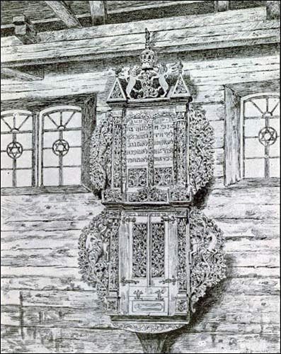 Беларуская (тарашкевіца): Сынагога ў Вузьлянах, арон-кадэш. Малюнак канца XIX ст.